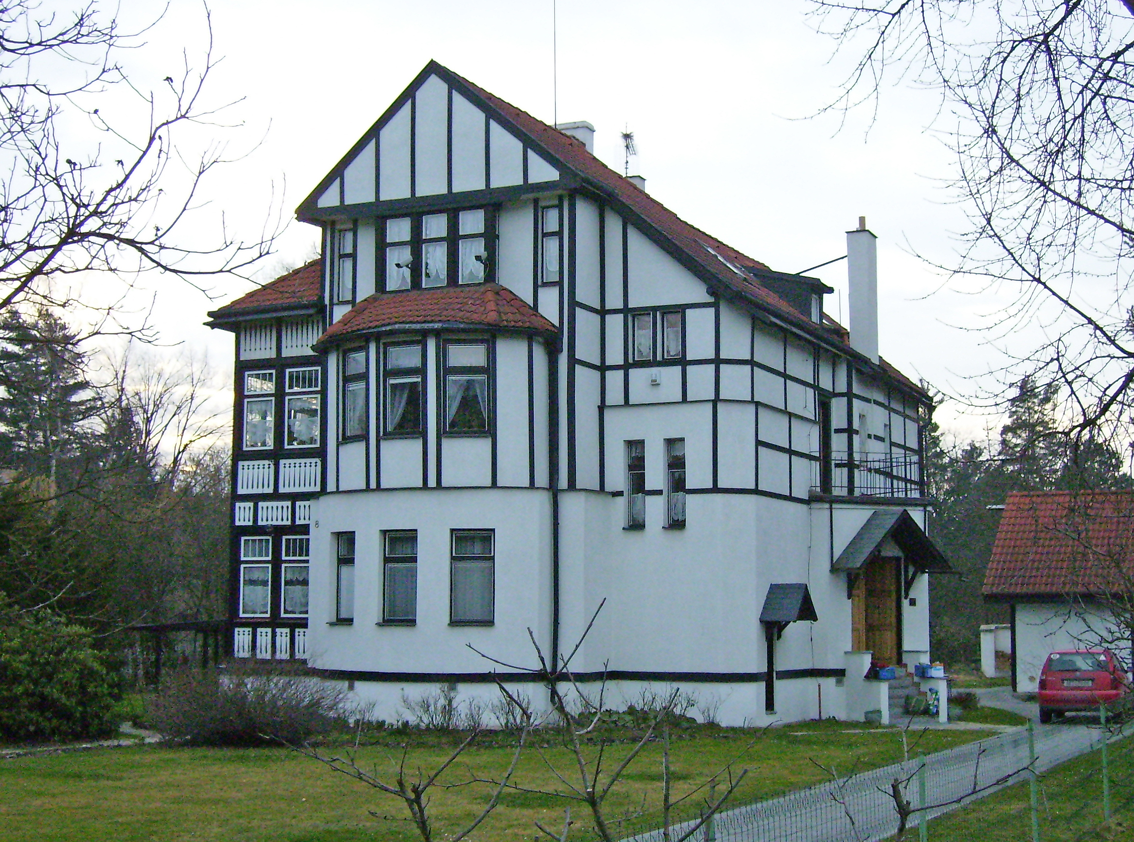 Typický klánovický dům z 20. let 20. století.